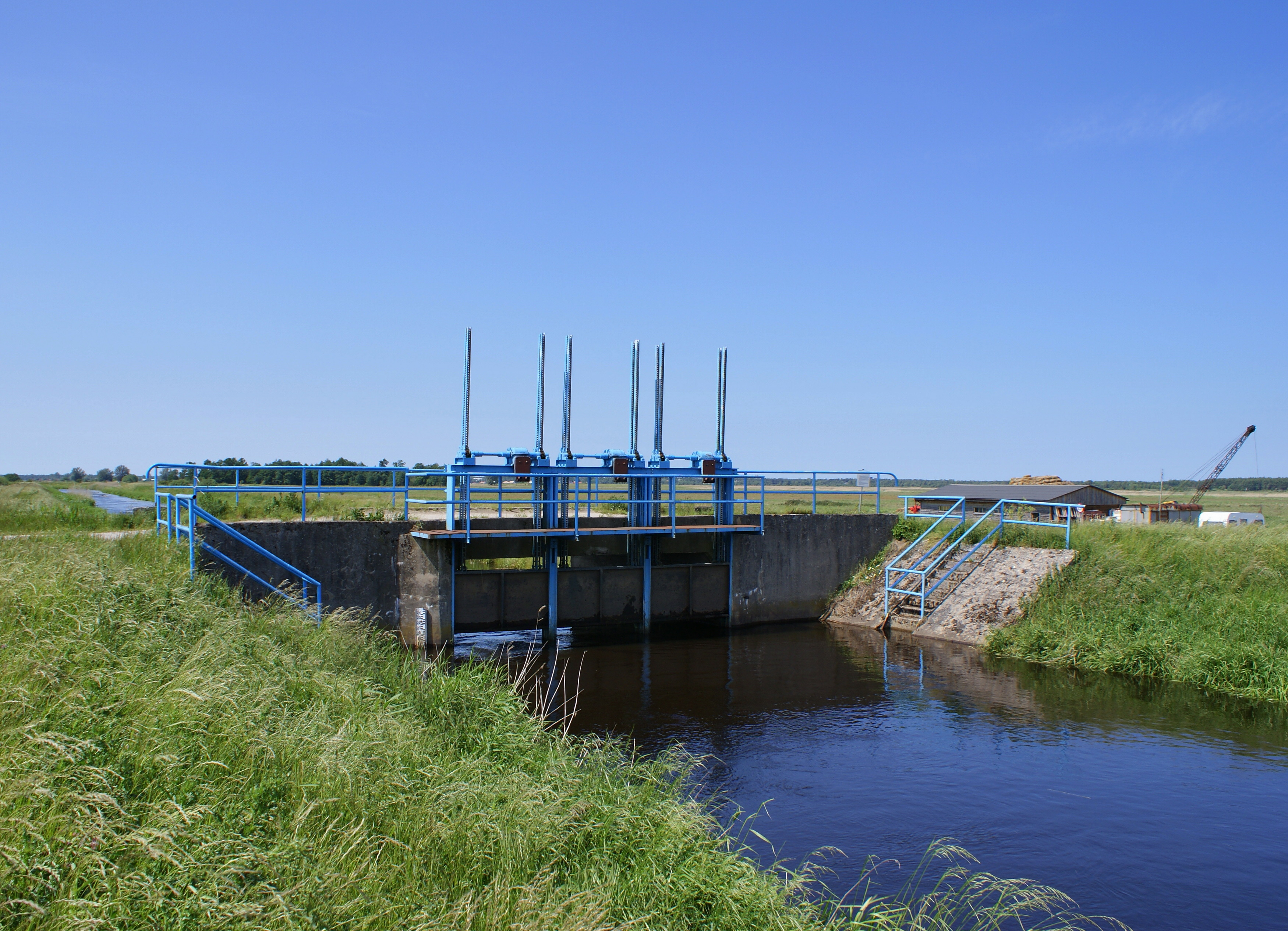 Jaz piętrzący wody Nowej Błotnicy (Bagienny Rów) na północ od Głowaczewa - ujęcie na północ